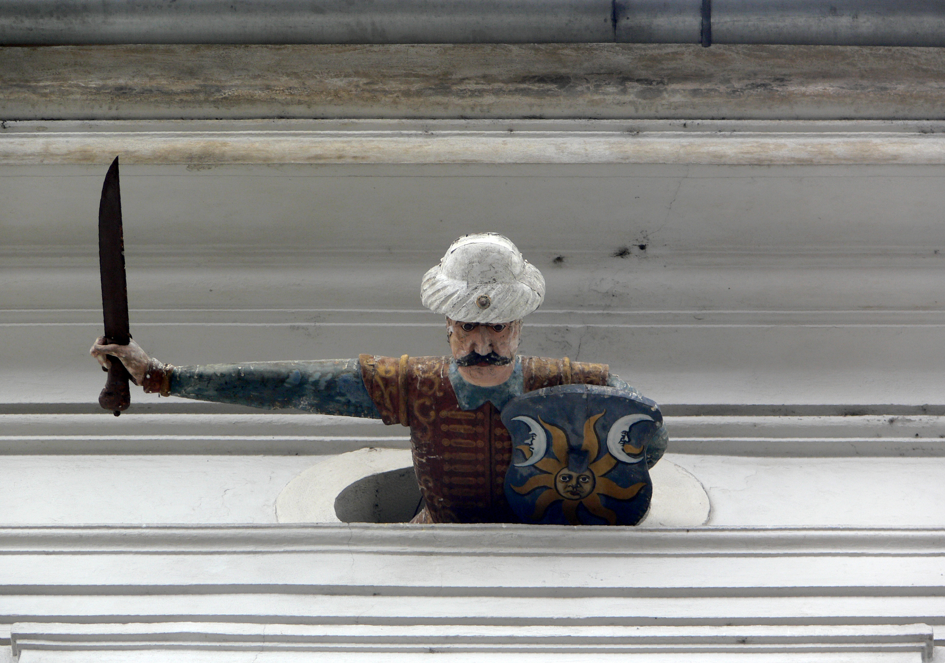 Palais Saurau, Graz; der „Türke“